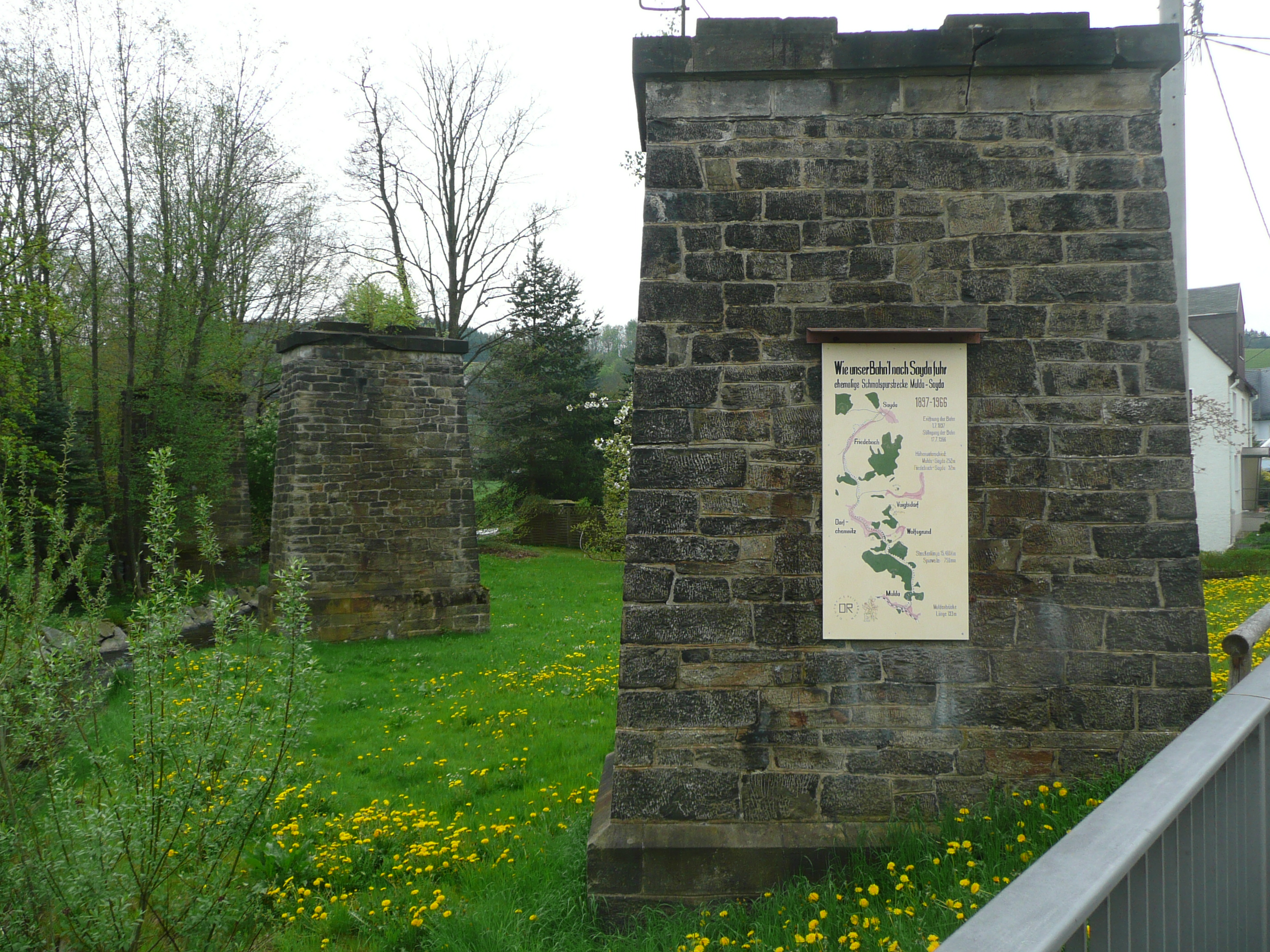 Die erhaltenen 4 Brückenpfeiler der ehemaligen Muldebrücke in Mulda/Sa.